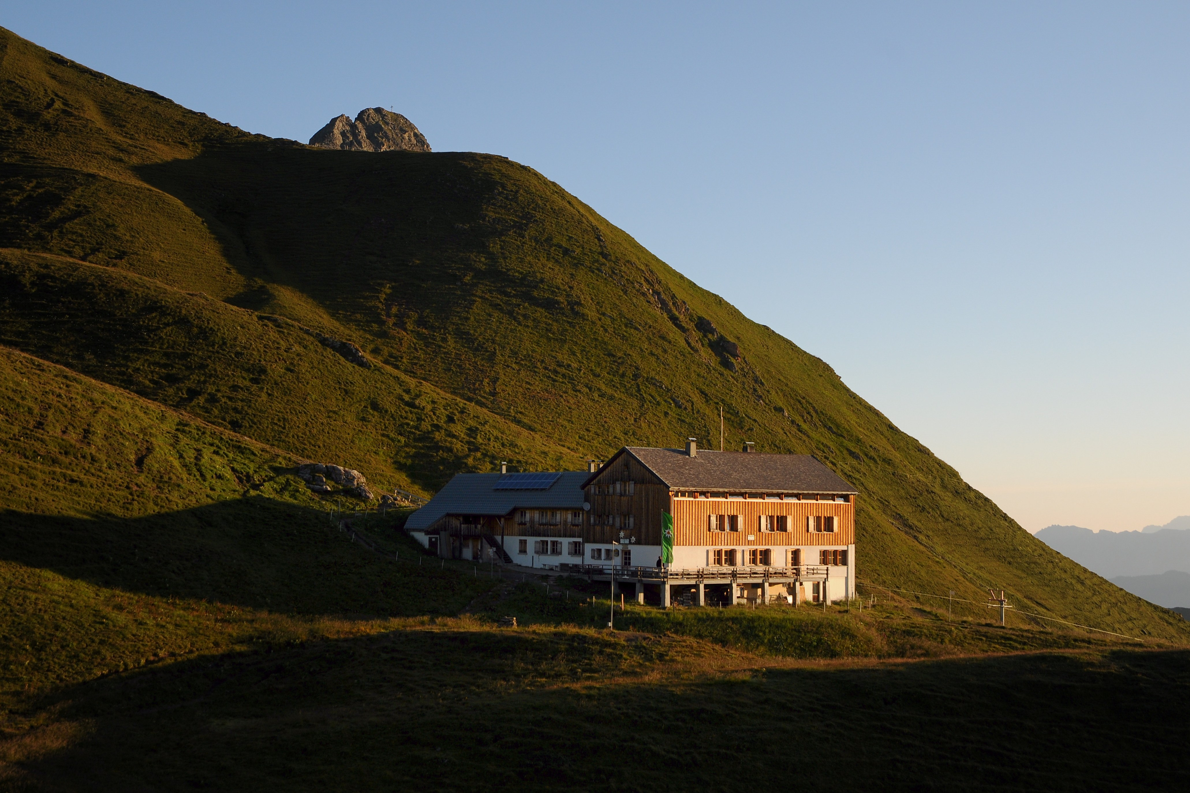 Sonnenaufgang auf der Tilisunhütte am 01. August 2011 um 6:30 Uhr über dem Tilisunasee im Gemeindegebiet von Tschagguns. Im Hintergrund der Gipfel des Tilisuna-Schwarzhorn.